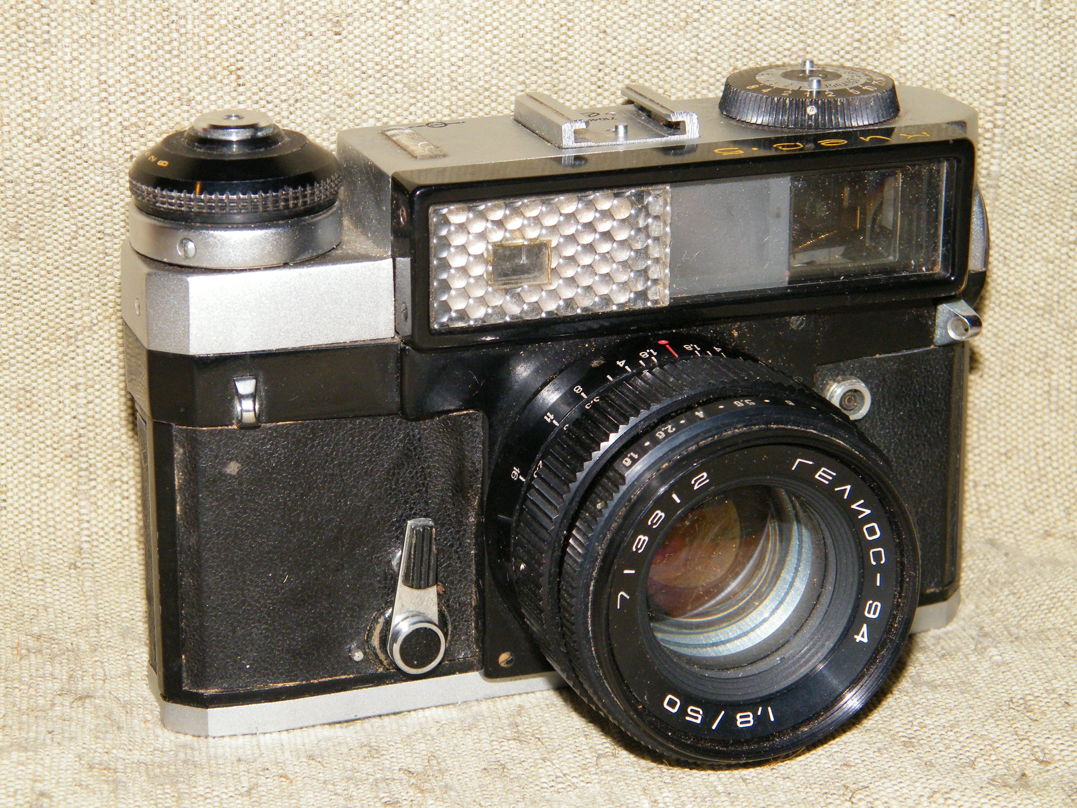 Kiev 5 rangefinder